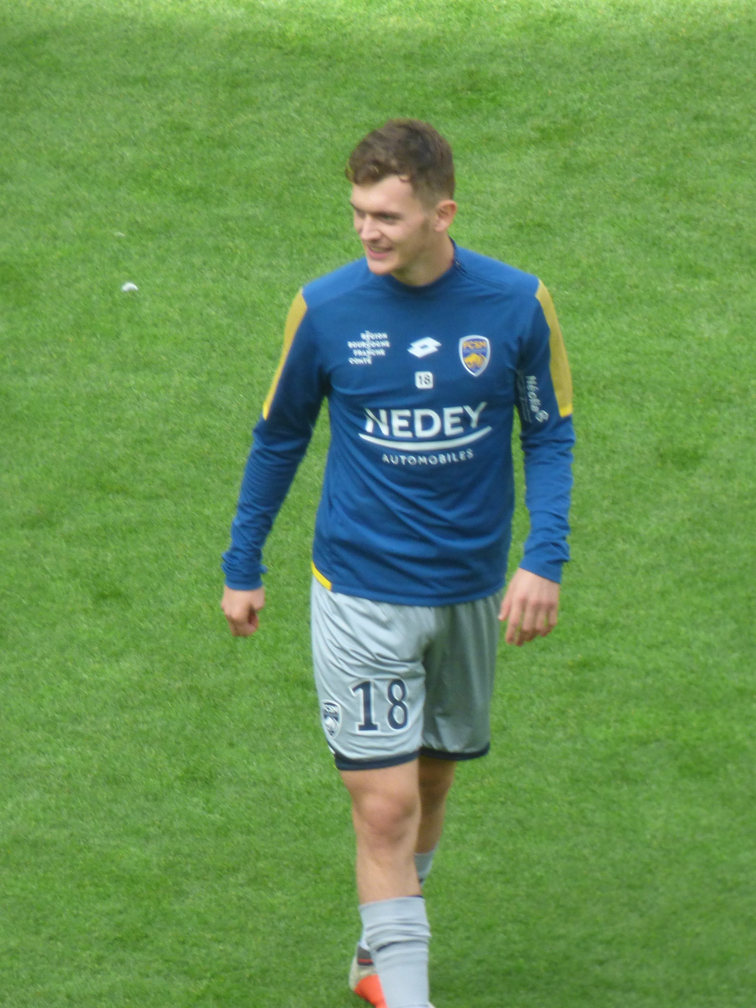 Jean Ruiz avant le match Lens / Sochaux, comptant pour la septième journée du championnat de France de football de Ligue 2, le 15 septembre 2018.